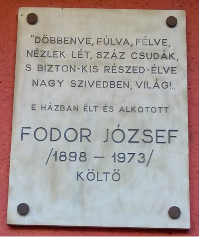 Fodor József emléktáblája (Budapest, XI. ker. Fehérvári út 33/A)